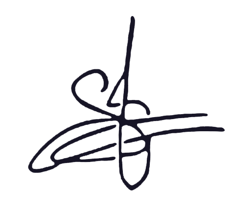 Autógrafo de Sébastien Izambard, de Il Divo